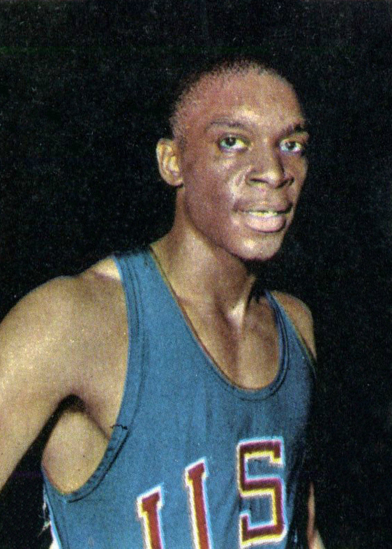 CAMPIONI DELLO SPORT 1969/70- n. 19 - MATTHEWS (USA)-ATLETICA